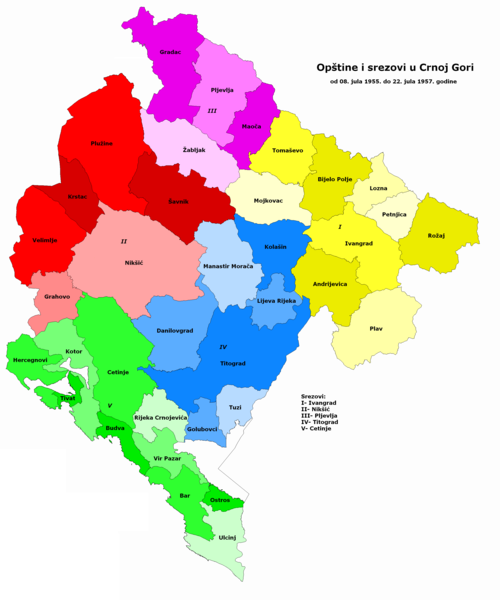 Аутор: Варјачић Владимир.